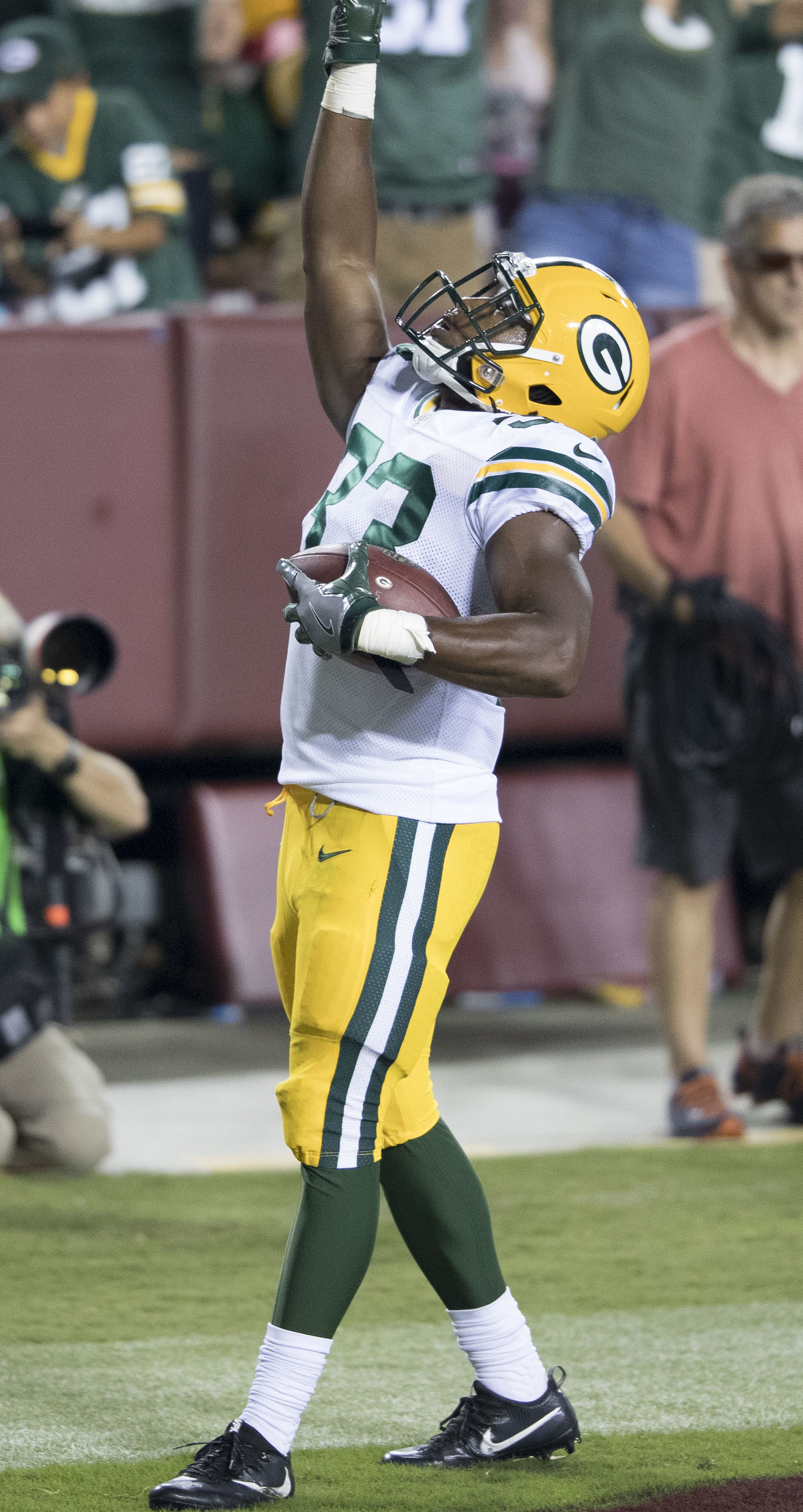 Packers at Redskins 8/19/17